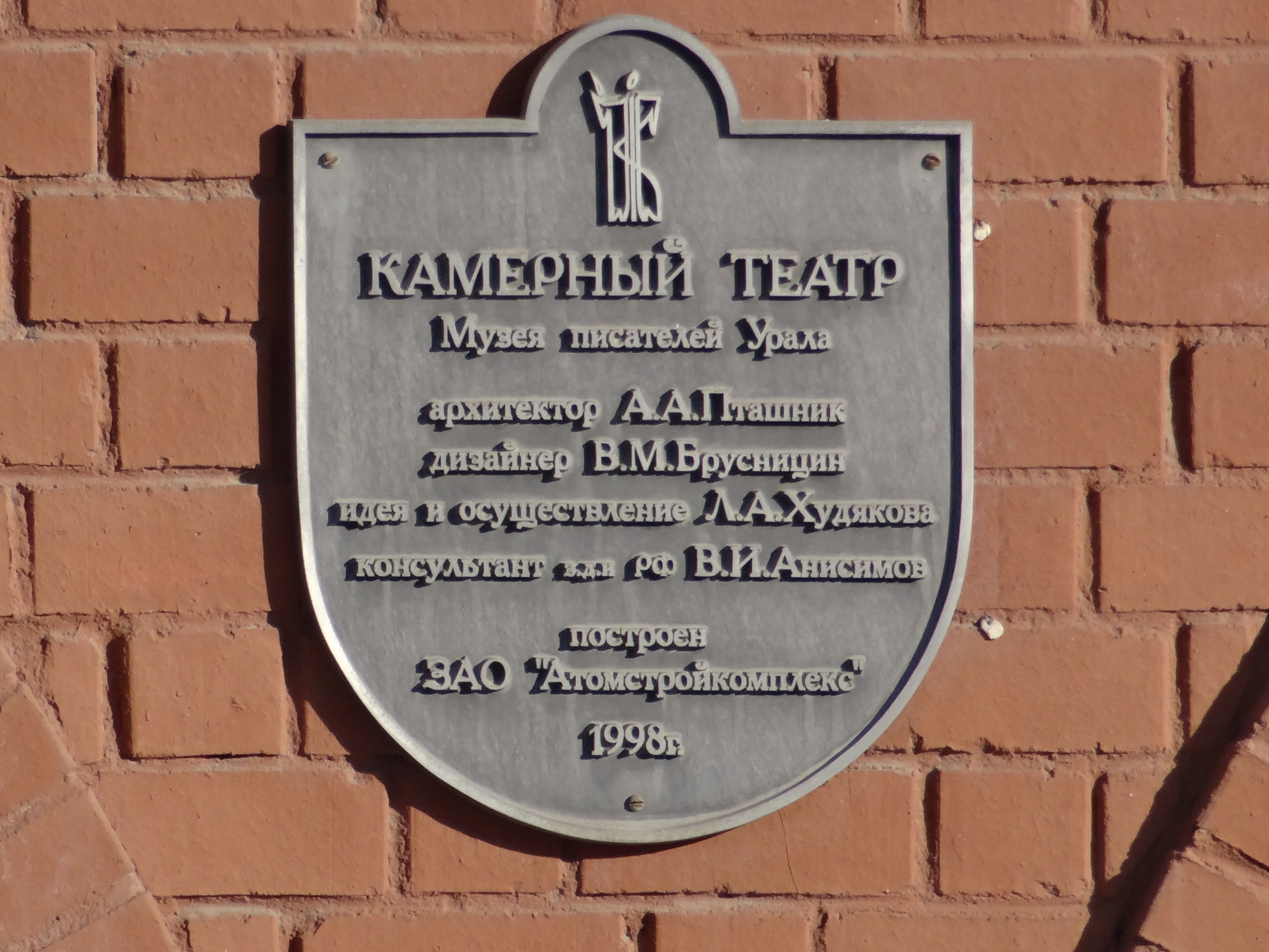 Объединенный музей писателей Урала. Адрес: Екатеринбург, Пролетарская 18.